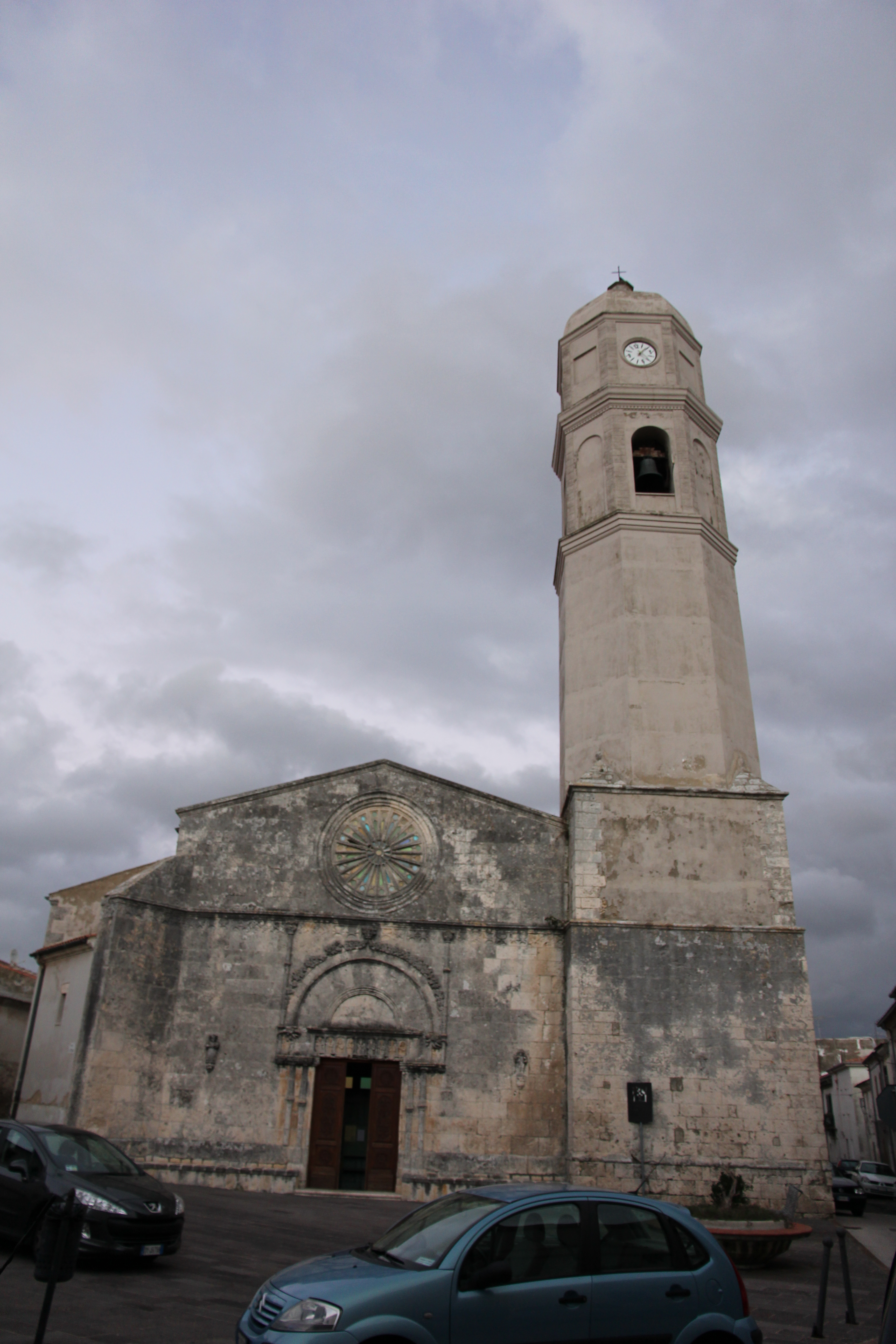 Thiesi - Chiesa di Santa Vittoria